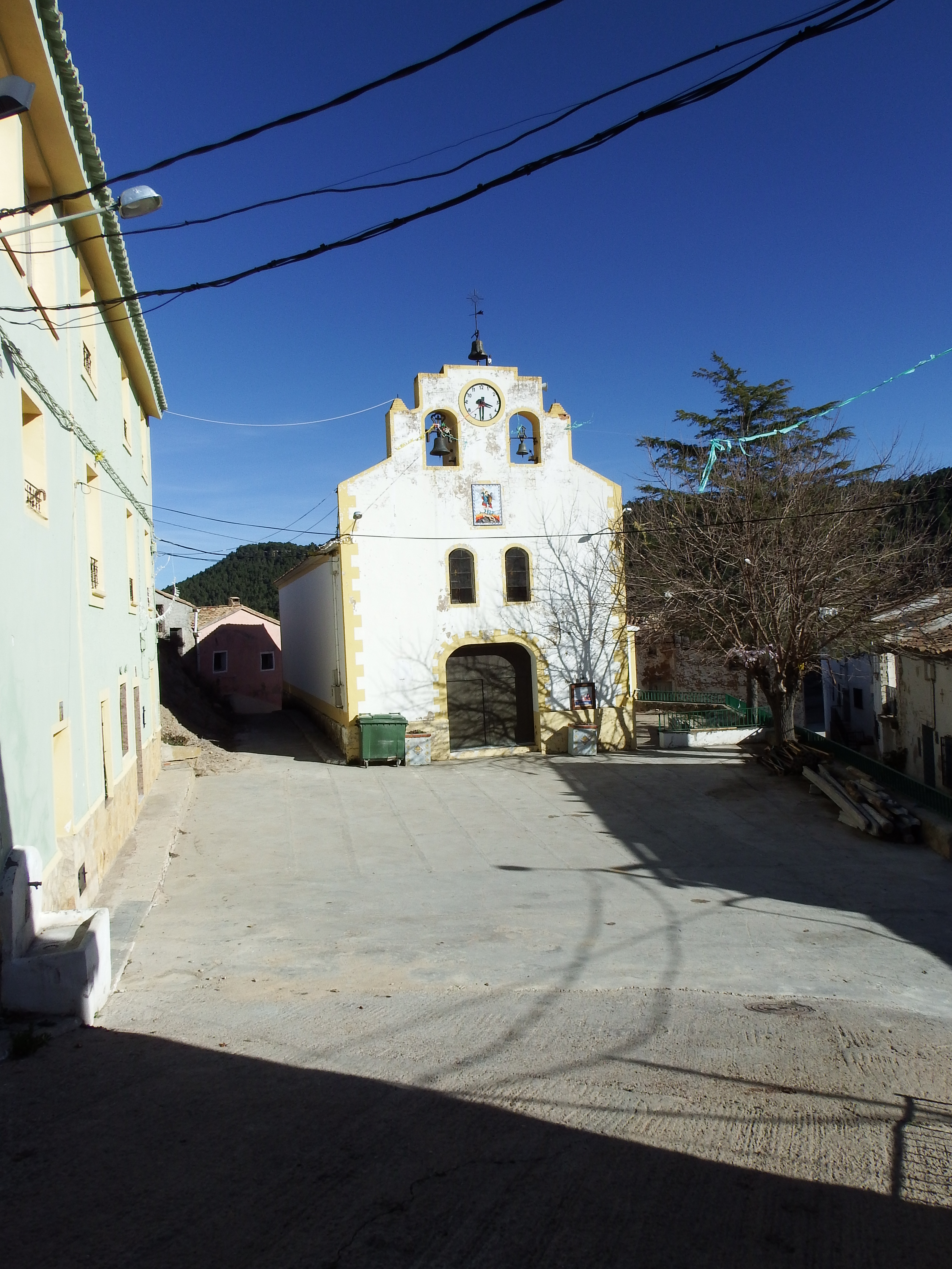 Iglesia de Narboneta